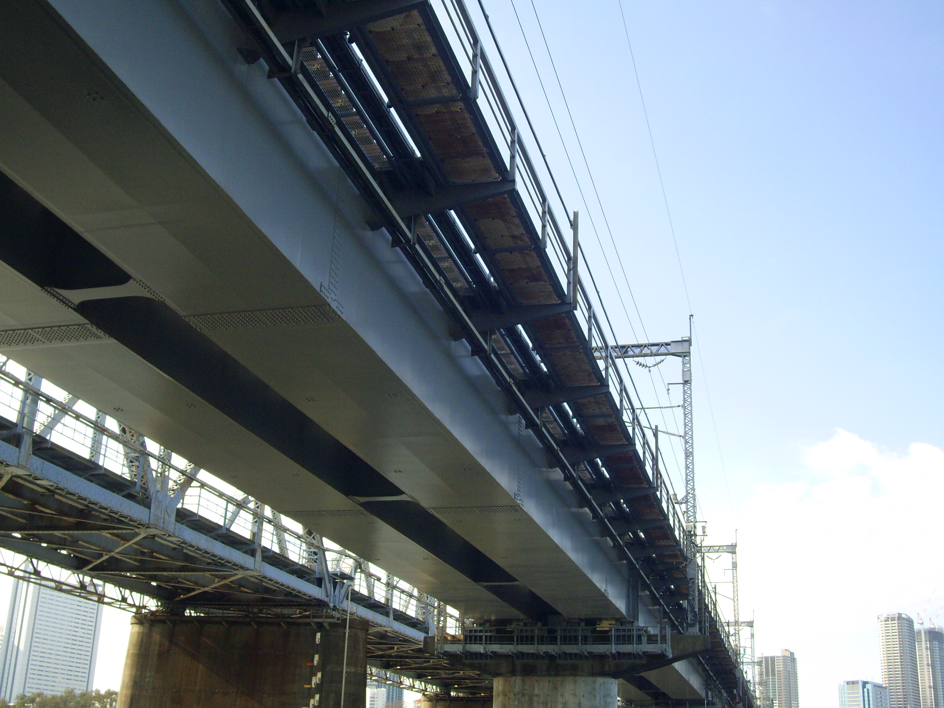 東海道新幹線多摩川橋梁の下部構造、フランジ部分が無床版無道床のため枕木が見える。外側の張り出しは保守点検の作業通路 ㊟カメラを起動すると日付機能が出荷時のものに初期化されるため、ファイル履歴の投稿日時とメタデータの原画像データの生成日時が異なります（概要欄の日付が撮影日）